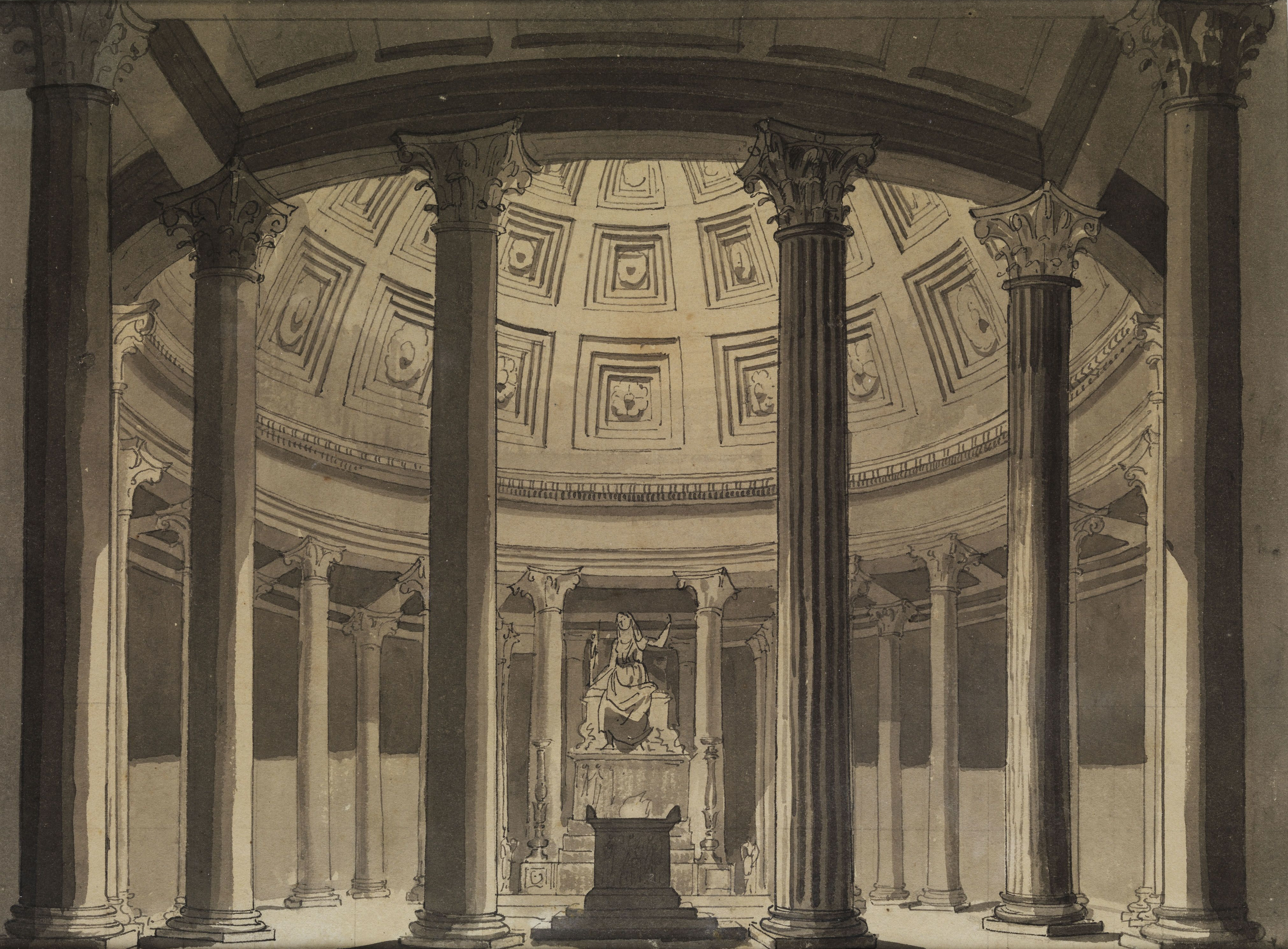 Bühnenbildentwurf Tempel der Vesta. Vorstudie (?) zu Spontinis „Die Vestalin“, Berlin 1818. Tusche auf Papier, teilweise laviert. 17 x 23,1 cm.